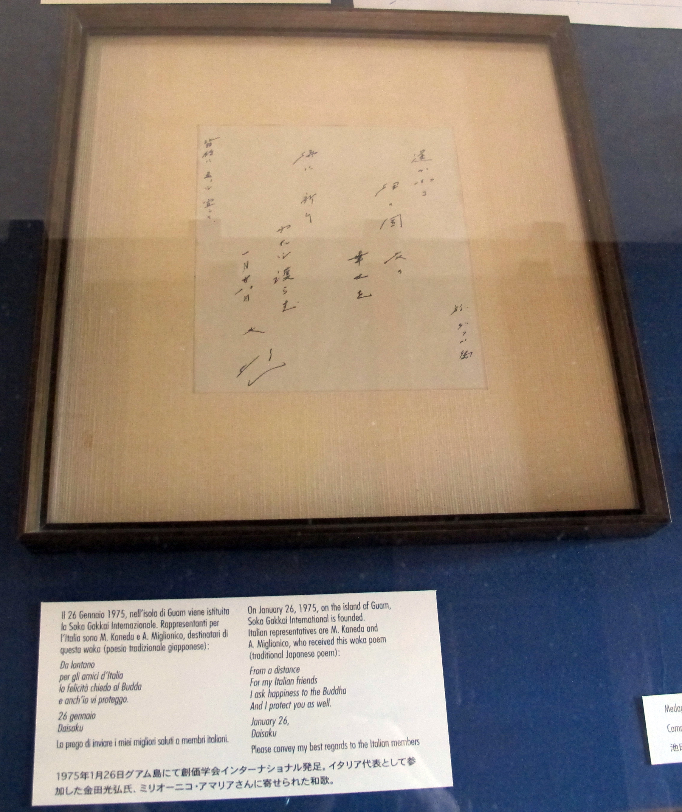 Villa Le Brache, Firenze